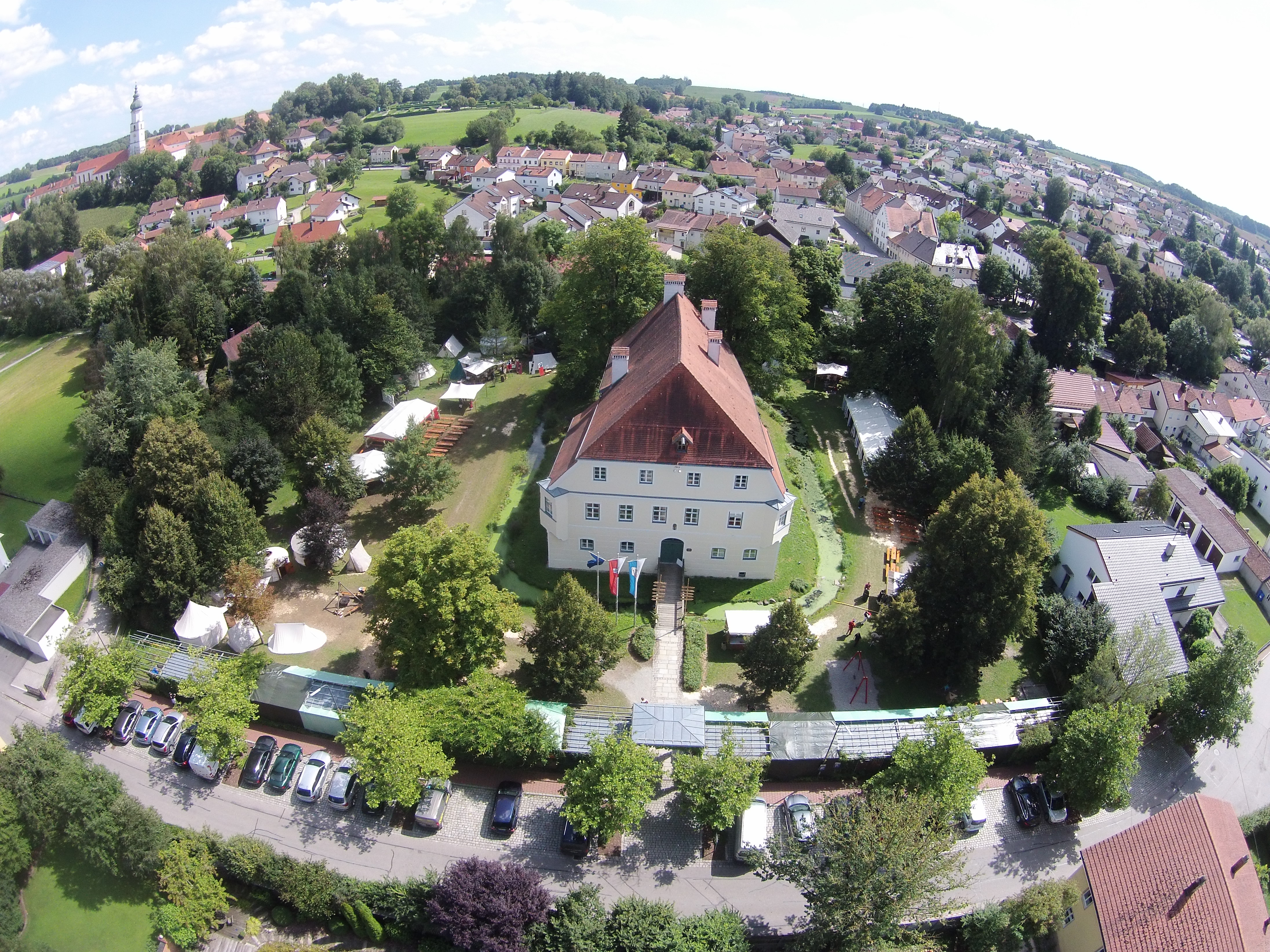 Luftaufnahme des Schloss Adelstein mit Umgebung und Blick Richtung Süden